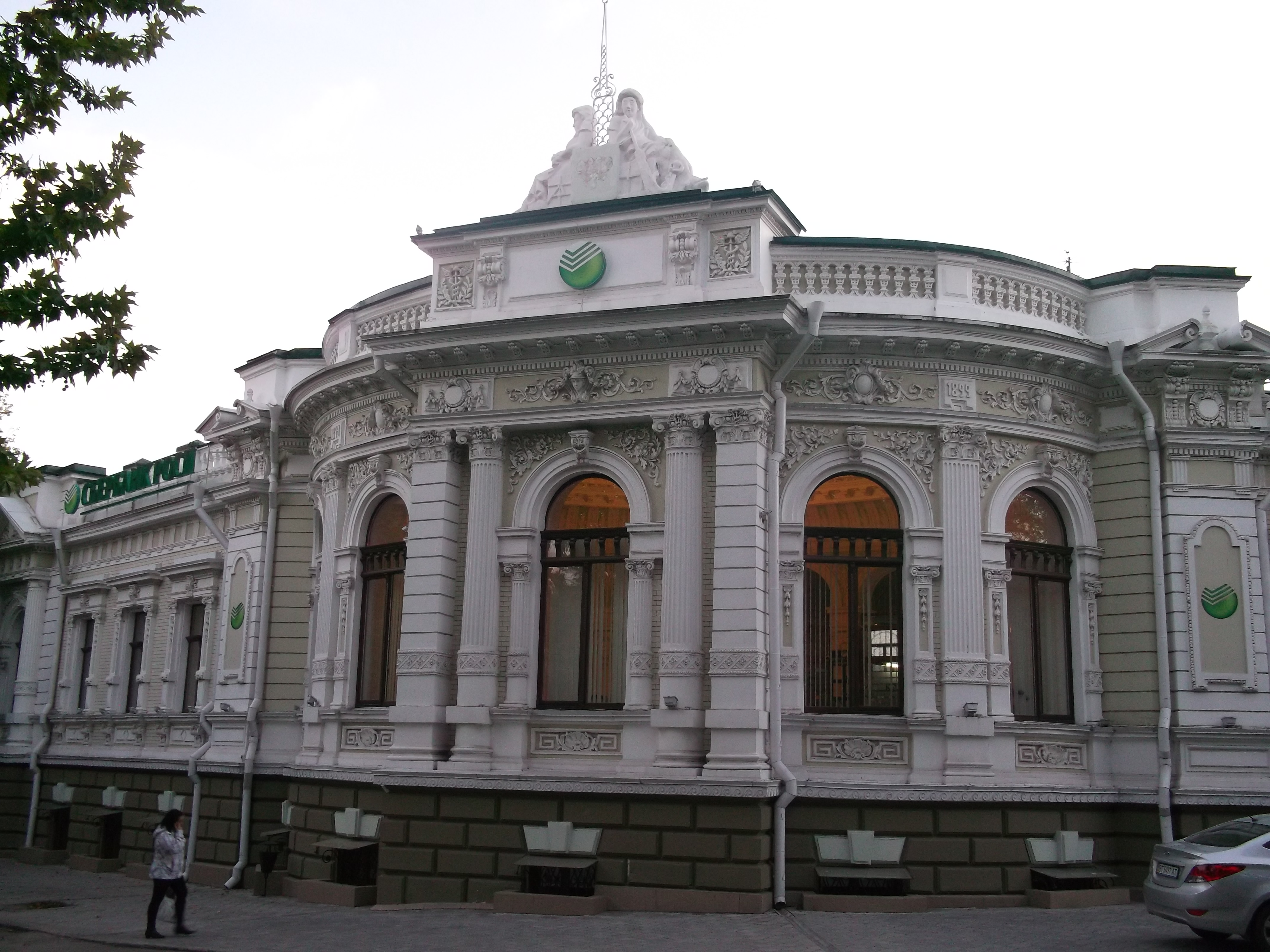 Банк ( нині грязелікарня ), Херсон, Суворова вул., 37